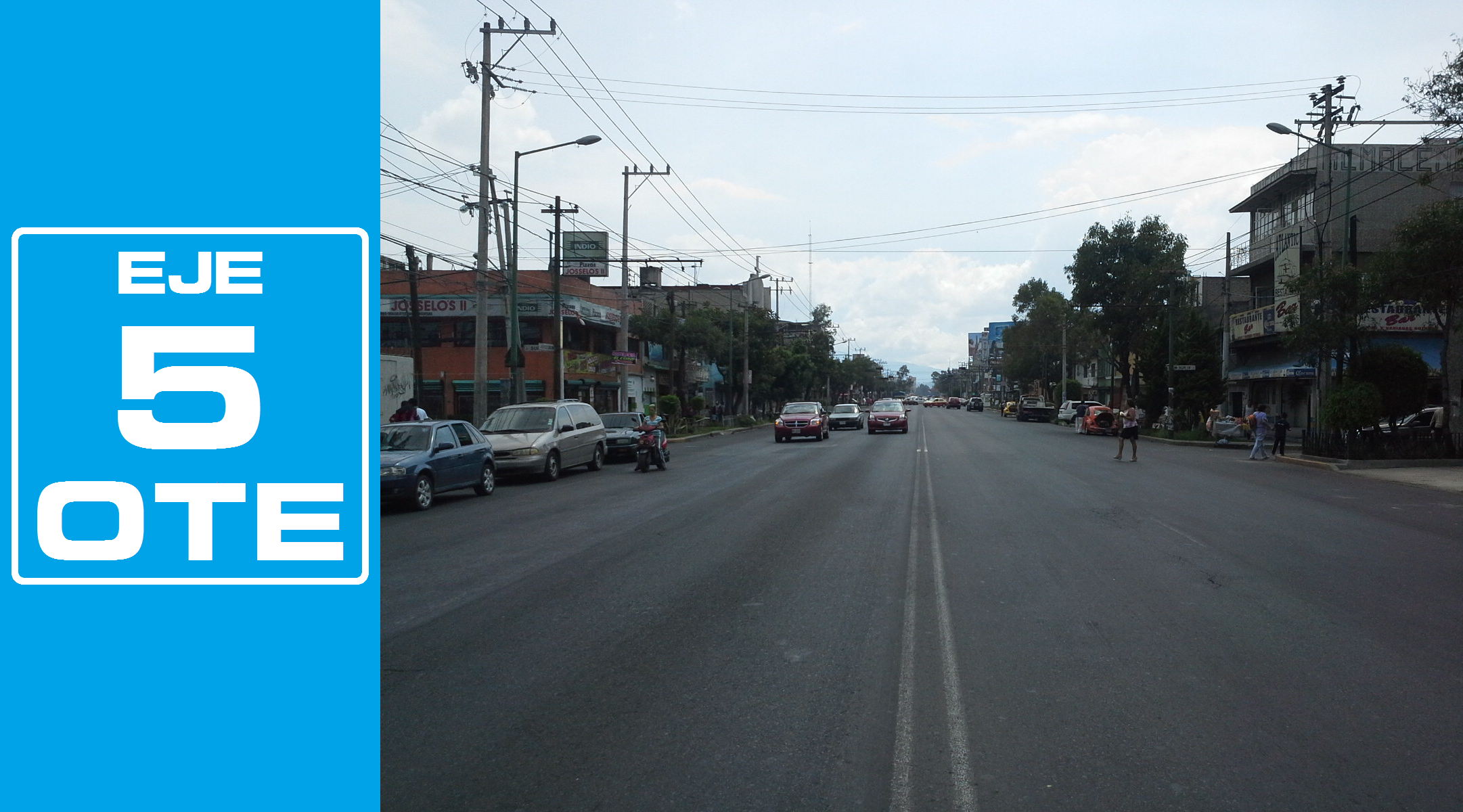 Rediseñado original de la señalética de los Ejes viales de la Ciudad de México por José García (Wiki ID: narumiyama)